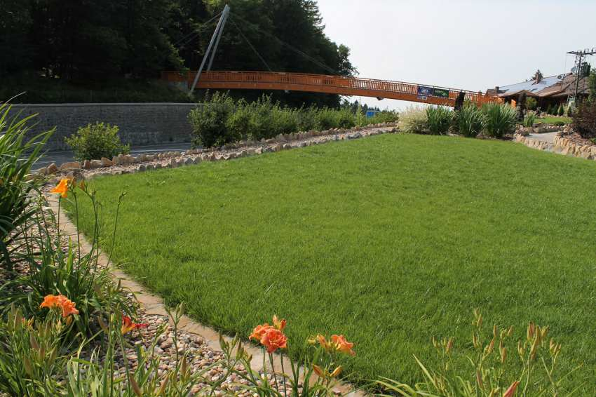 Motorest Samota